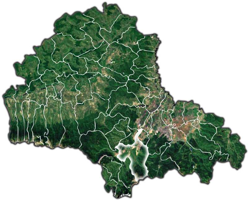 Rasnov jud Brasov.